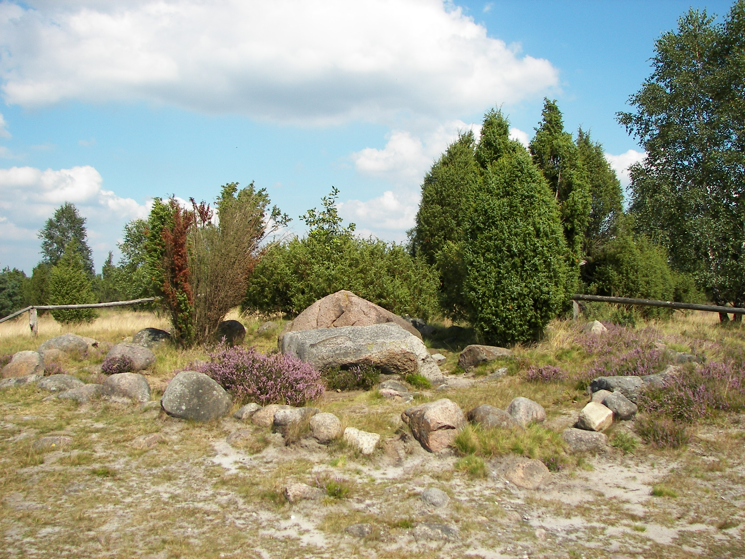 "Hannibals Grab" (kein Hünengrab) in der Lüneburger Heide bei Wilsede